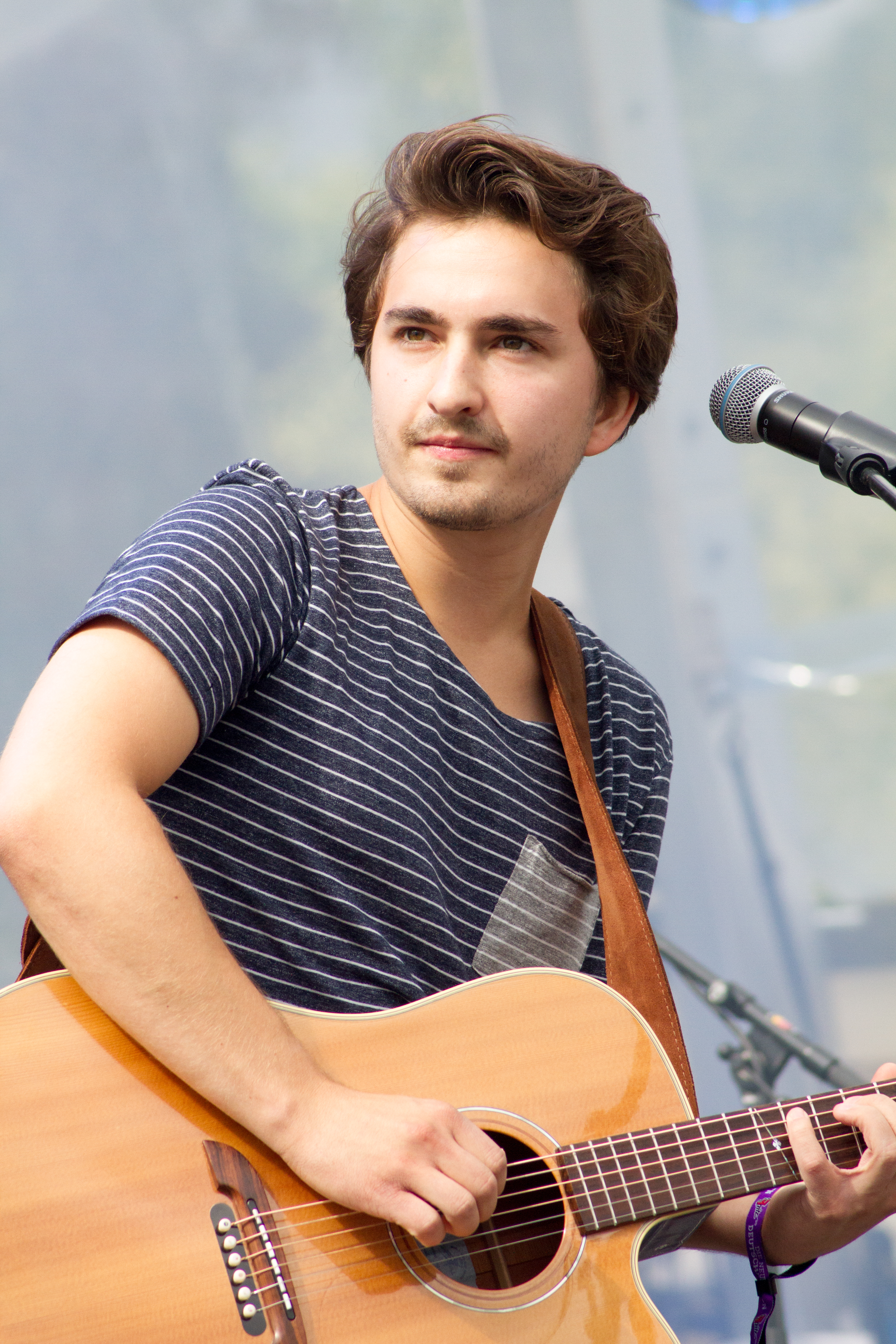 Philipp Dittberner beim Fritz - Die Neuen DeutschPoeten Musikfestival vom 5. September 2015 das in Berlin stattfand.